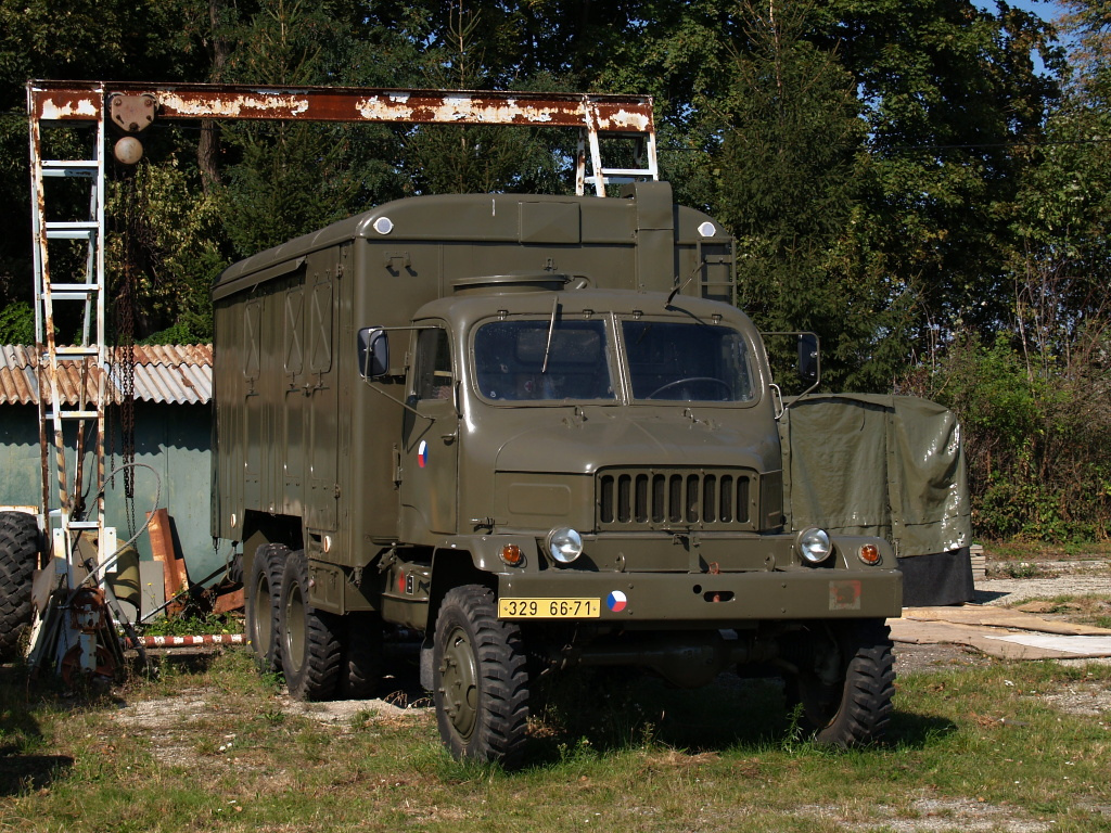 329 66-71 | Armáda ČR